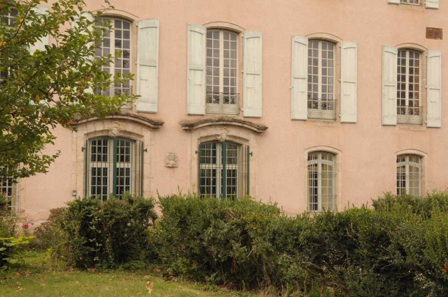 Palais épiscopal, (Inscrit, 1983) .